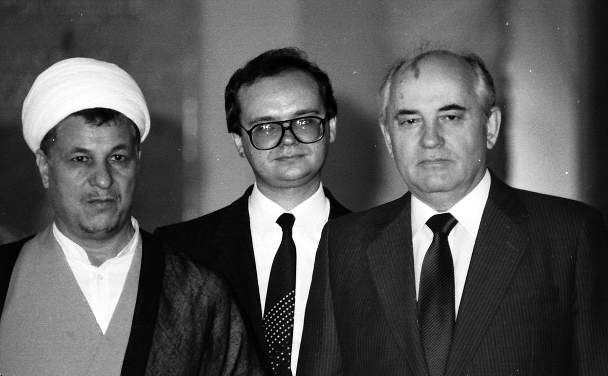 اکبر هاشمی رفسنجانی و میخائیل گورباچف در سال 1368 خورشیدی